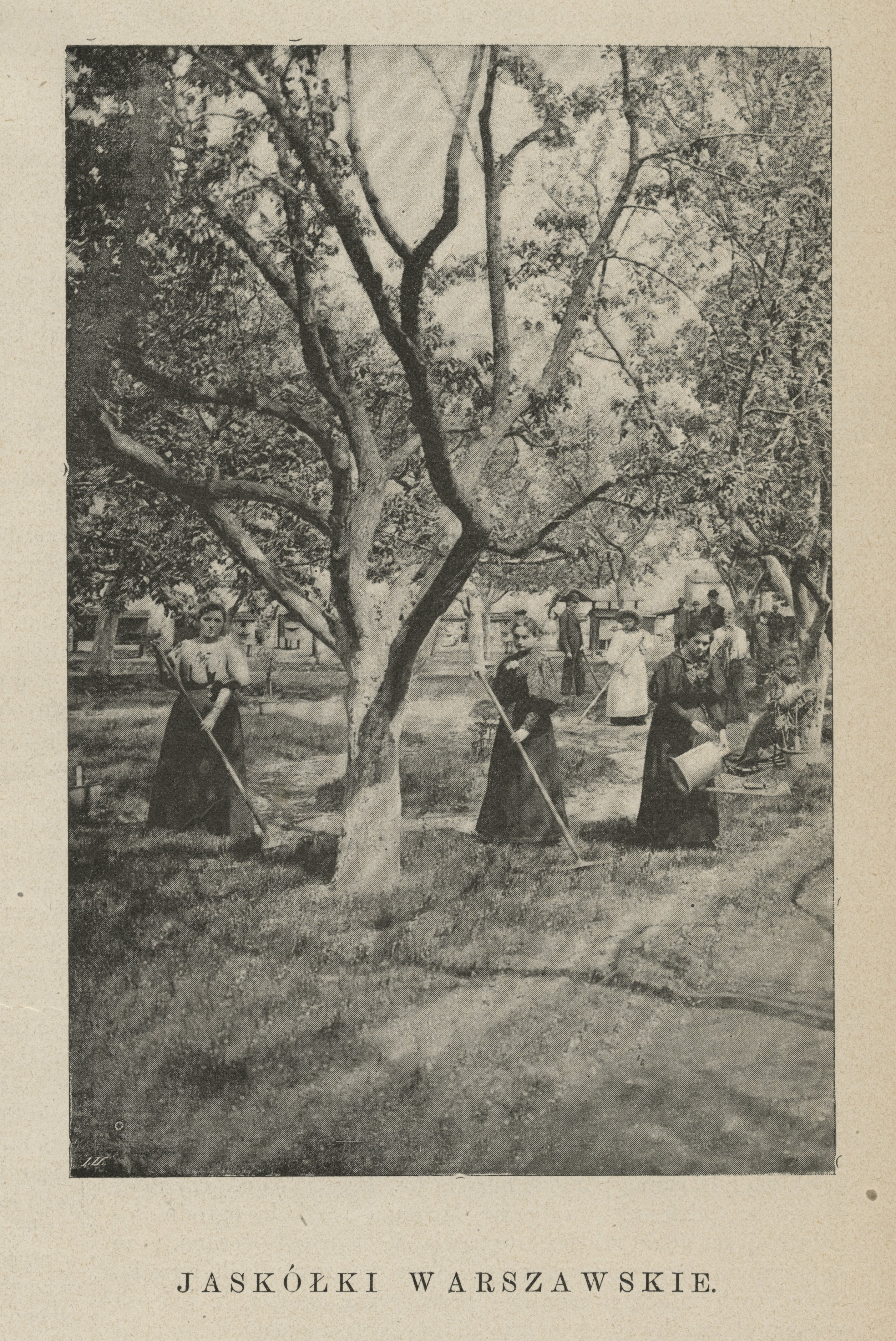 Jaskółki warszawskie Szkoła ogrodnicza dla kobiet przy ul. Wiejskiej